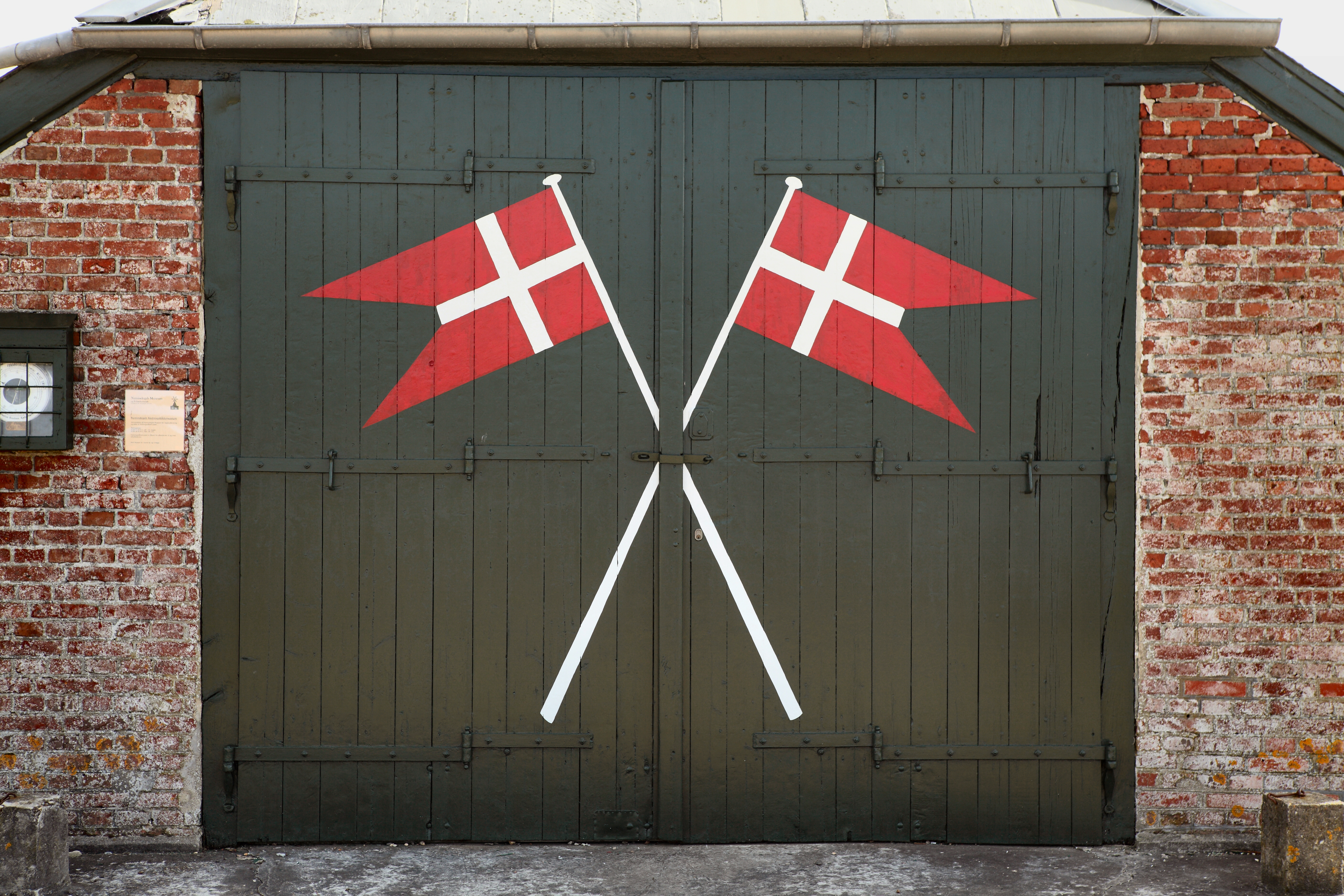 Redningsstation - port typisk for danske redningsstationer